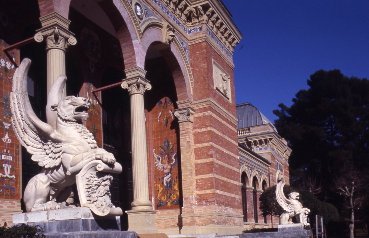 Servizio fotografico : Madrid, 1980 / Paolo Monti. - Foglio: 1, Fotogrammi complessivi: 20/20 : Diapositiva, sviluppo cromogeno/ pellicola ; 35 mm. - ((Iscrizione manoscritta su una striscia di cartoncino bianco: "Spagna/ Madrid" all'interno del contenitore. - Fonte: Rubrica di Paolo Monti: Diapositive 24x36mm (1948-1982), presso Archivio Paolo Monti. Rubrica con elenco soggetti e numeri di inventario (da 1 a 1000) corrispondenti ai fogli a tasche in pvc in cui sono contenute le diapositive.